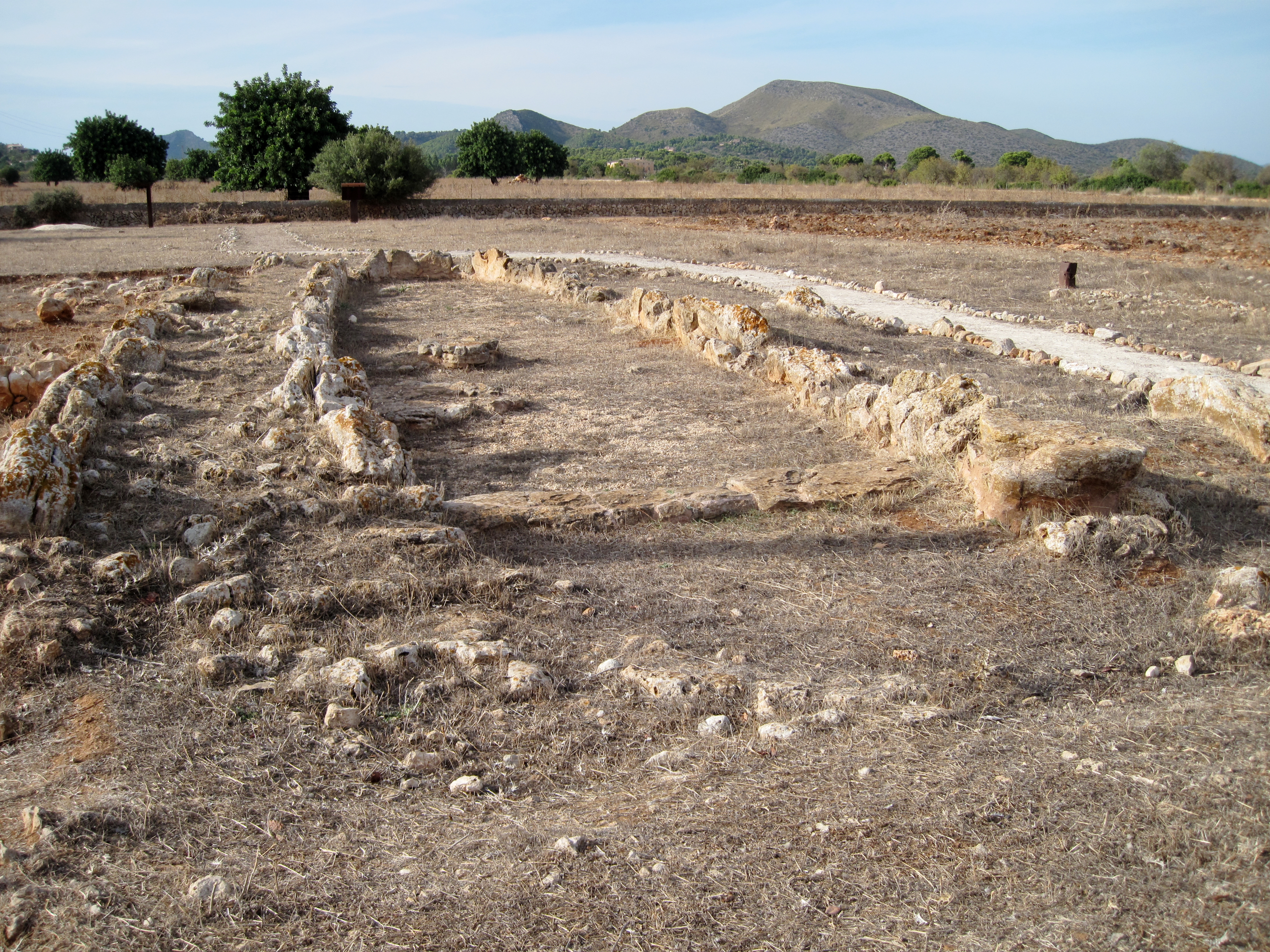 Naviforme Gebäuderreste im talaiotischen Dorf von S’Hospitalet Vell, einer Ausgrabungsstätte in der Gemeinde Manacor, Mallorca, Spanien